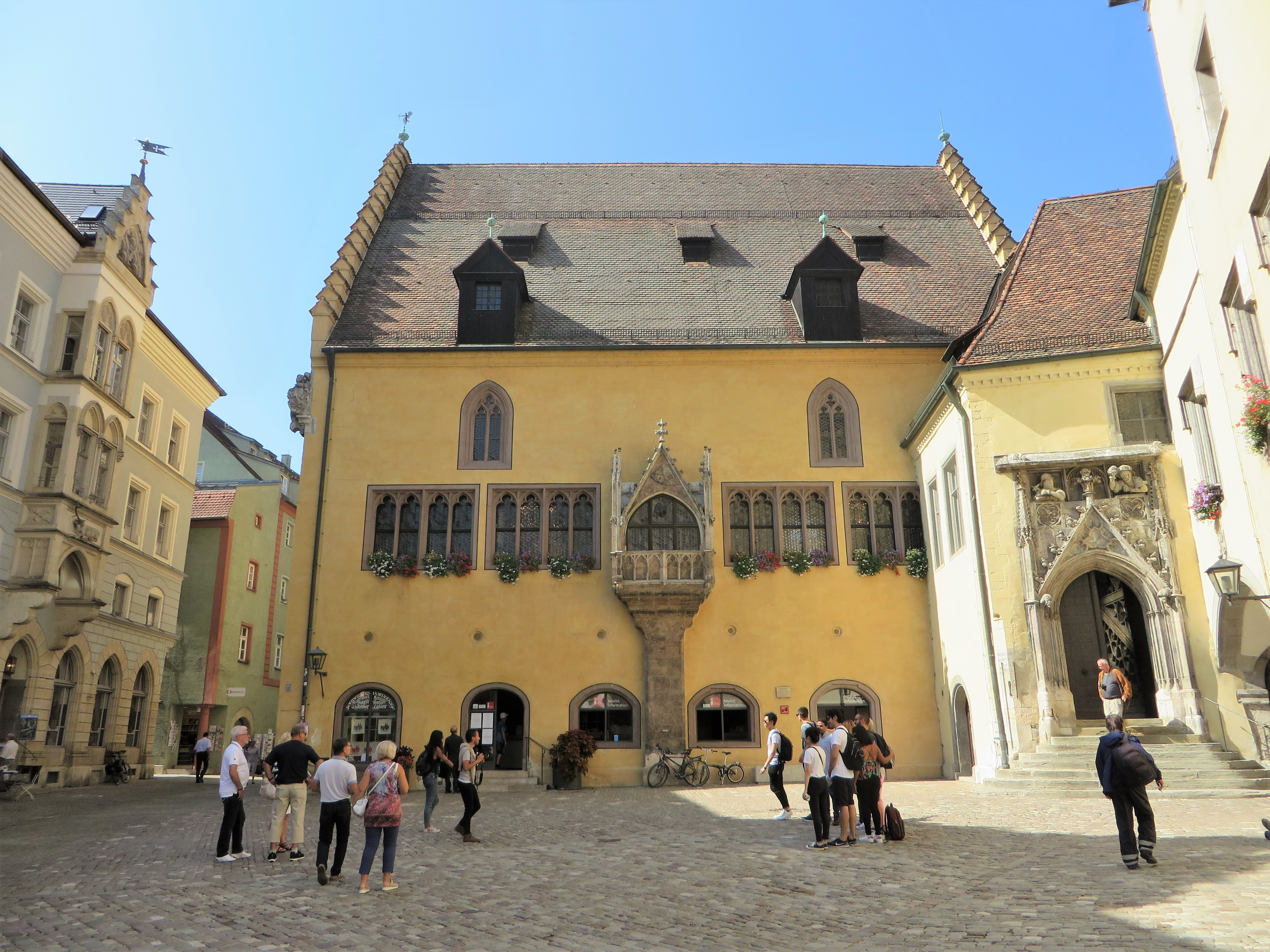 Altes Rathaus in Regensburg. Blick vom Rathausplatz, links die Neue-Waag-Gasse.